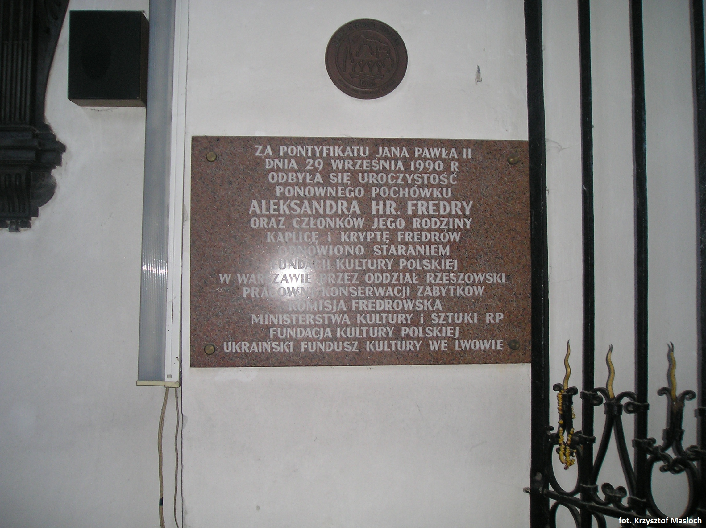 Sanktuarium Matki Bożej Rudeckiej tablica upamiętniająca ponowny pochówek Aleksandra Fredry (Ukraina)